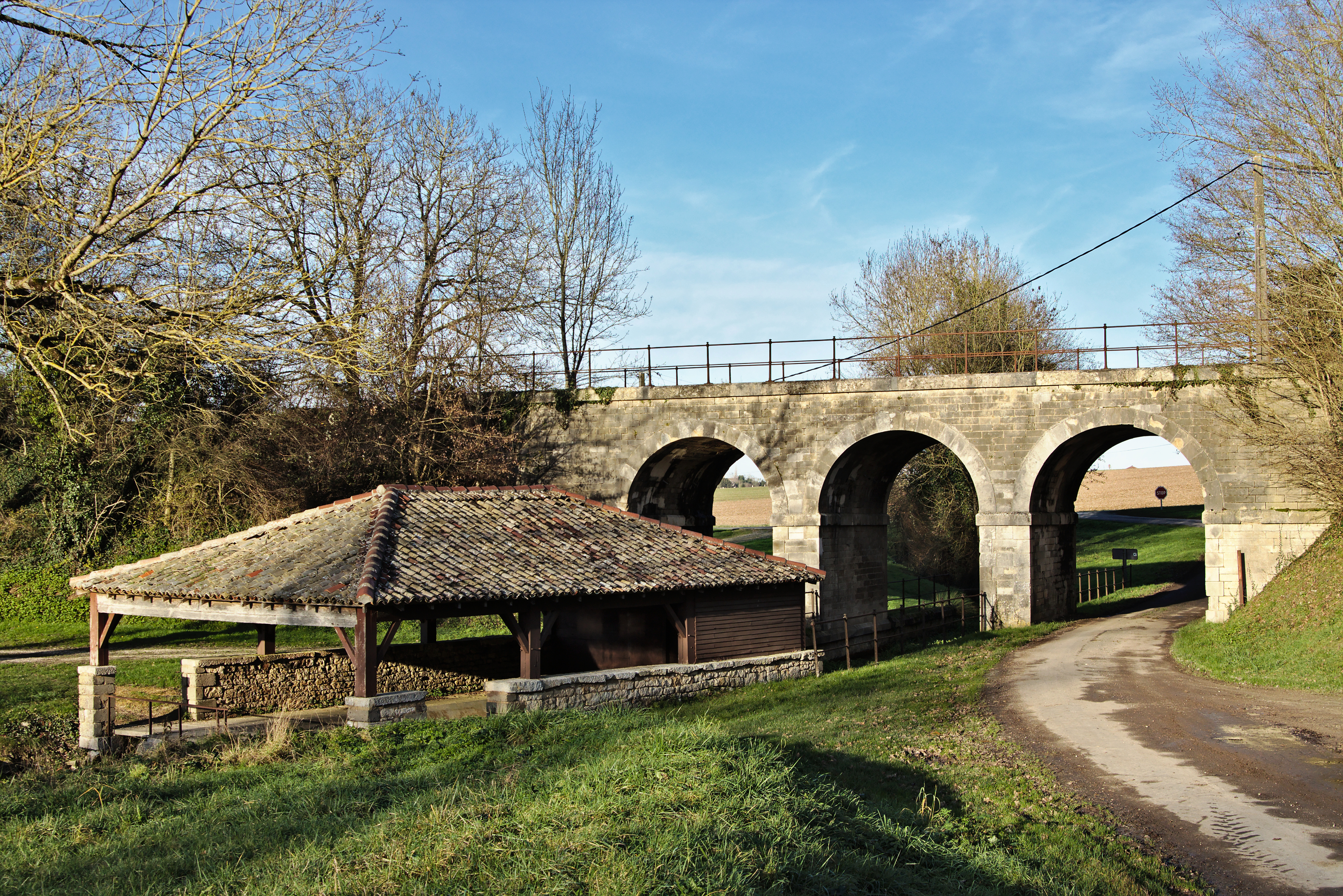 Fontaine de Lusseray et pont ferroviaire (voie désaffectée)